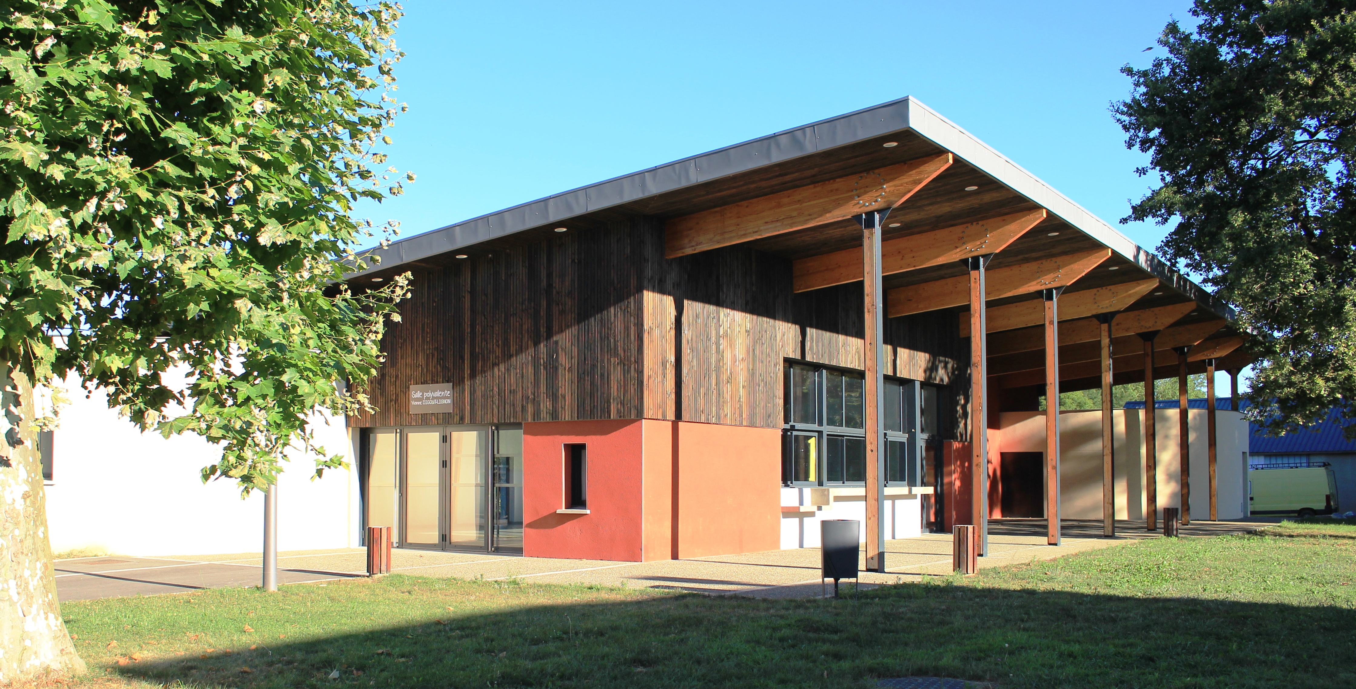 Salle des fêtes de Salles-Adour (Hautes-Pyrénées)